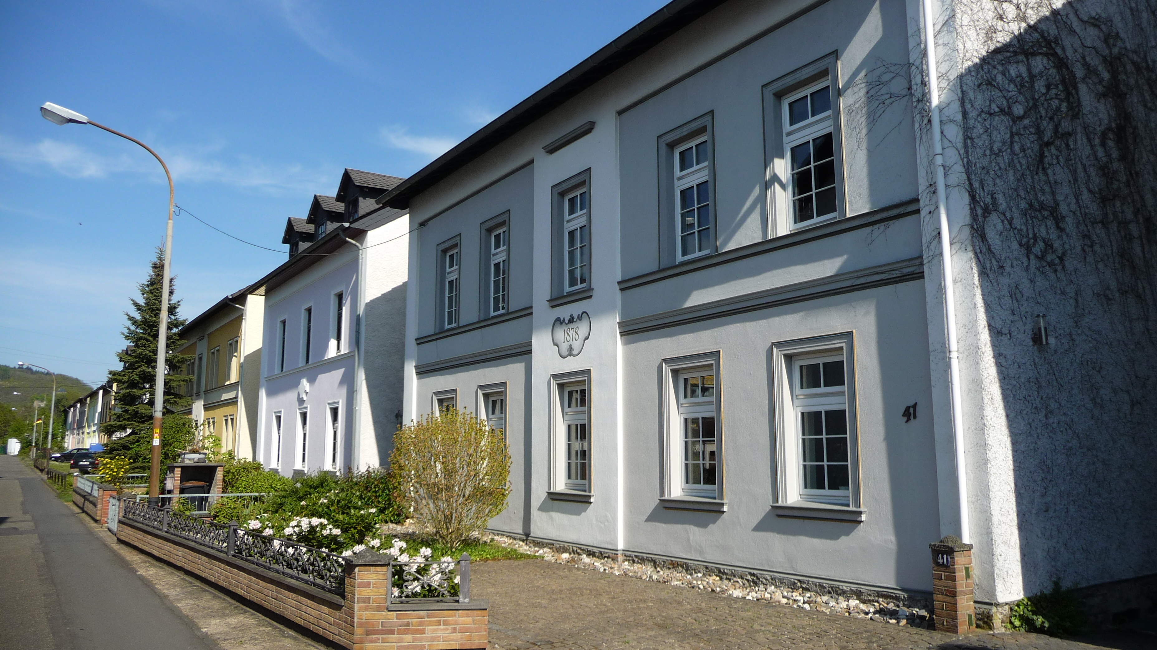 Bendorf Mülhofen: Arbeitersiedlung "Zwölf Apostel"